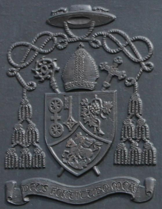 Wappen des Limburger Bischof August Kilian, an einer Gedenktafel in seiner Geburtsstadt Eltville im Rheingau